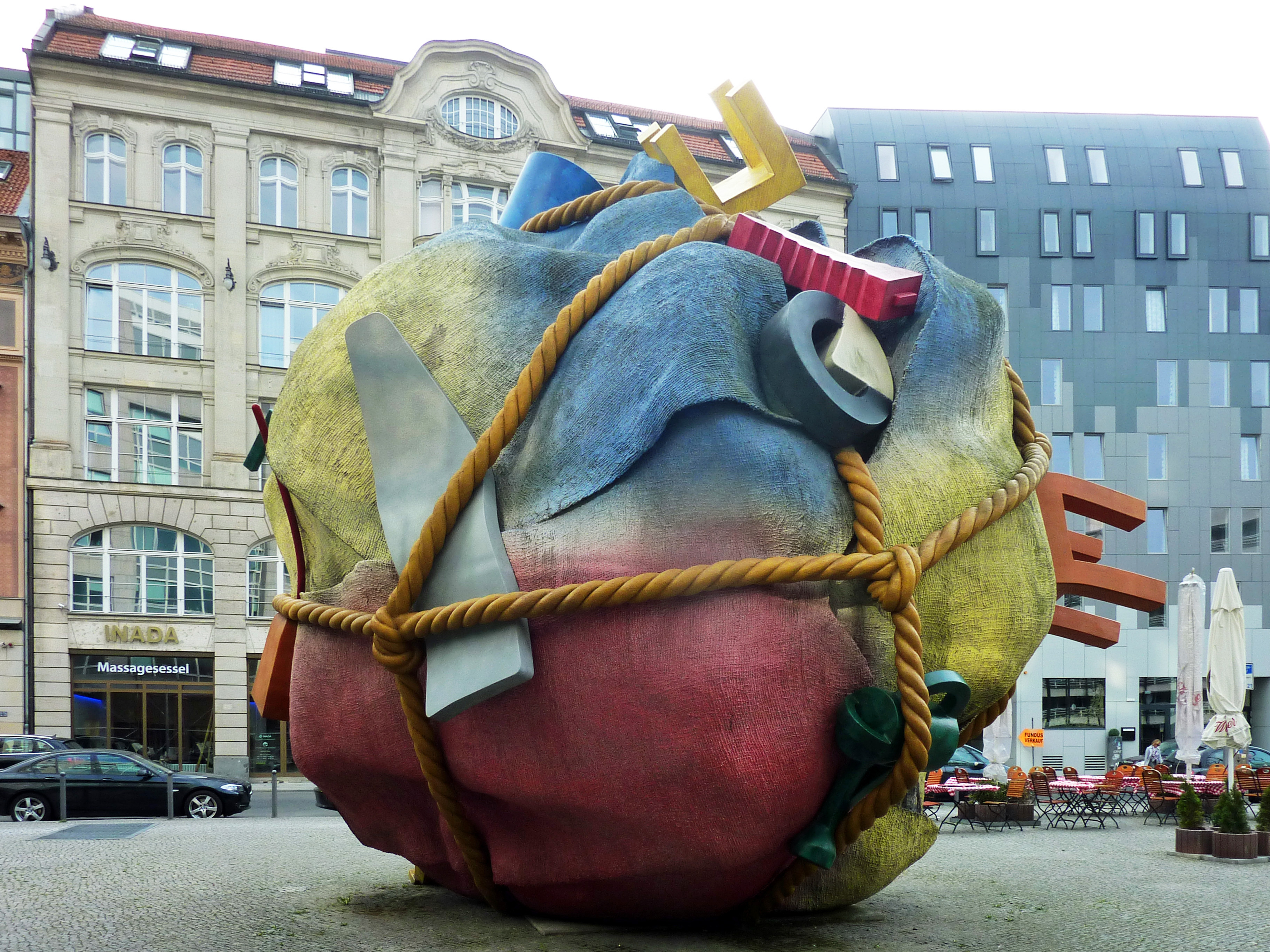 Skulptur 'Houseball' von Claes Oldenburg und Coosje van Bruggen auf dem Bethlehemkirchplatz in Berlin-Mitte. Blickrichtung West zur Mauerstraße.